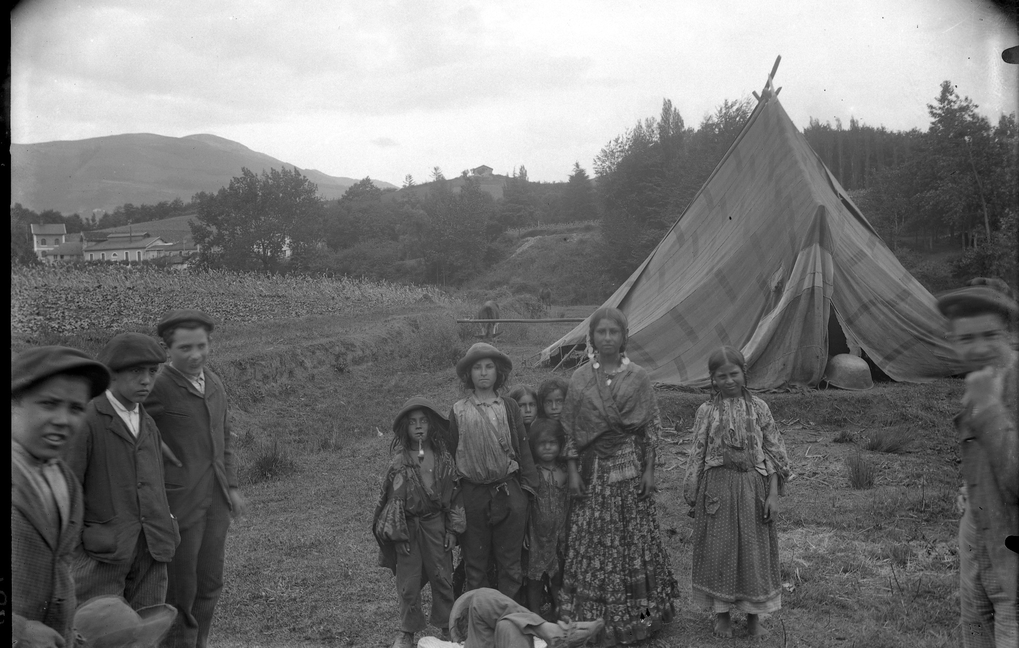 Hungariar talde bat